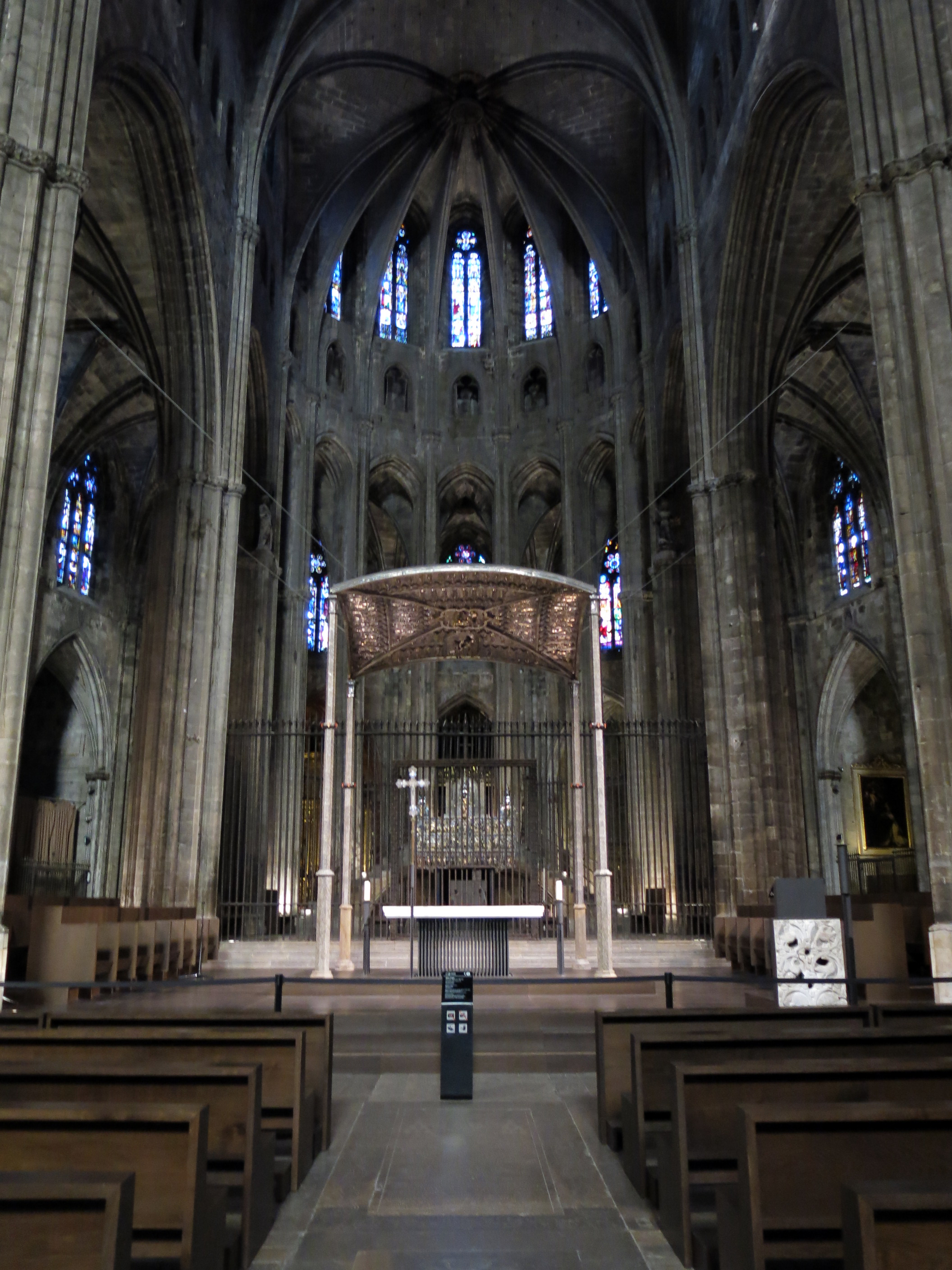 Catedral de Santa Maria (Girona)